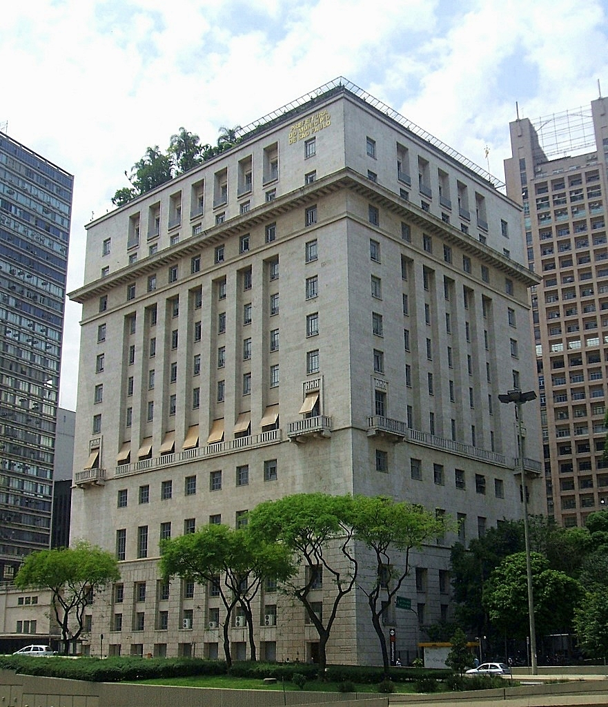 Palácio do Anhangabaú (Edifício Matarazzo), sede da Prefeitura de São Paulo. São Paulo, Brasil